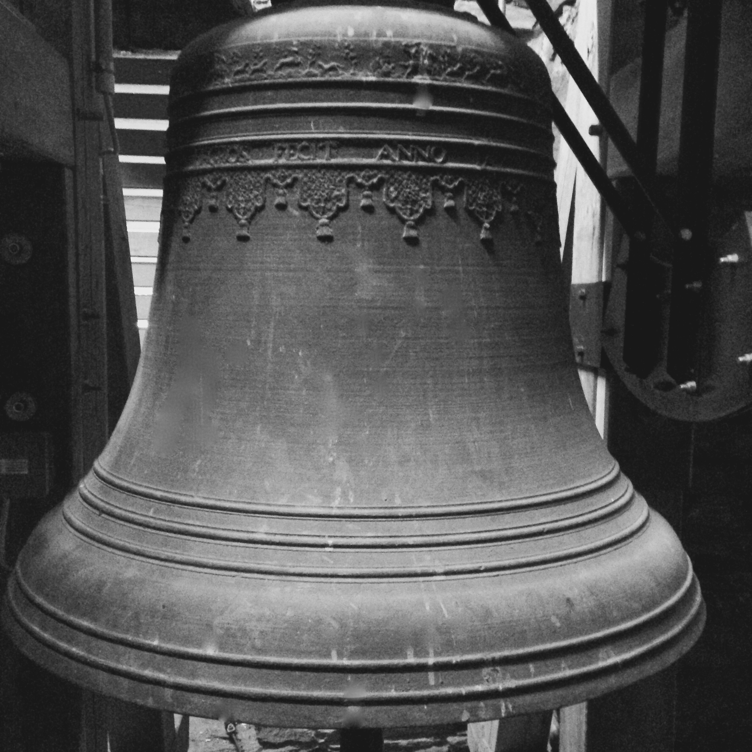 Stadtkirche Monschau; Glocke von 1789